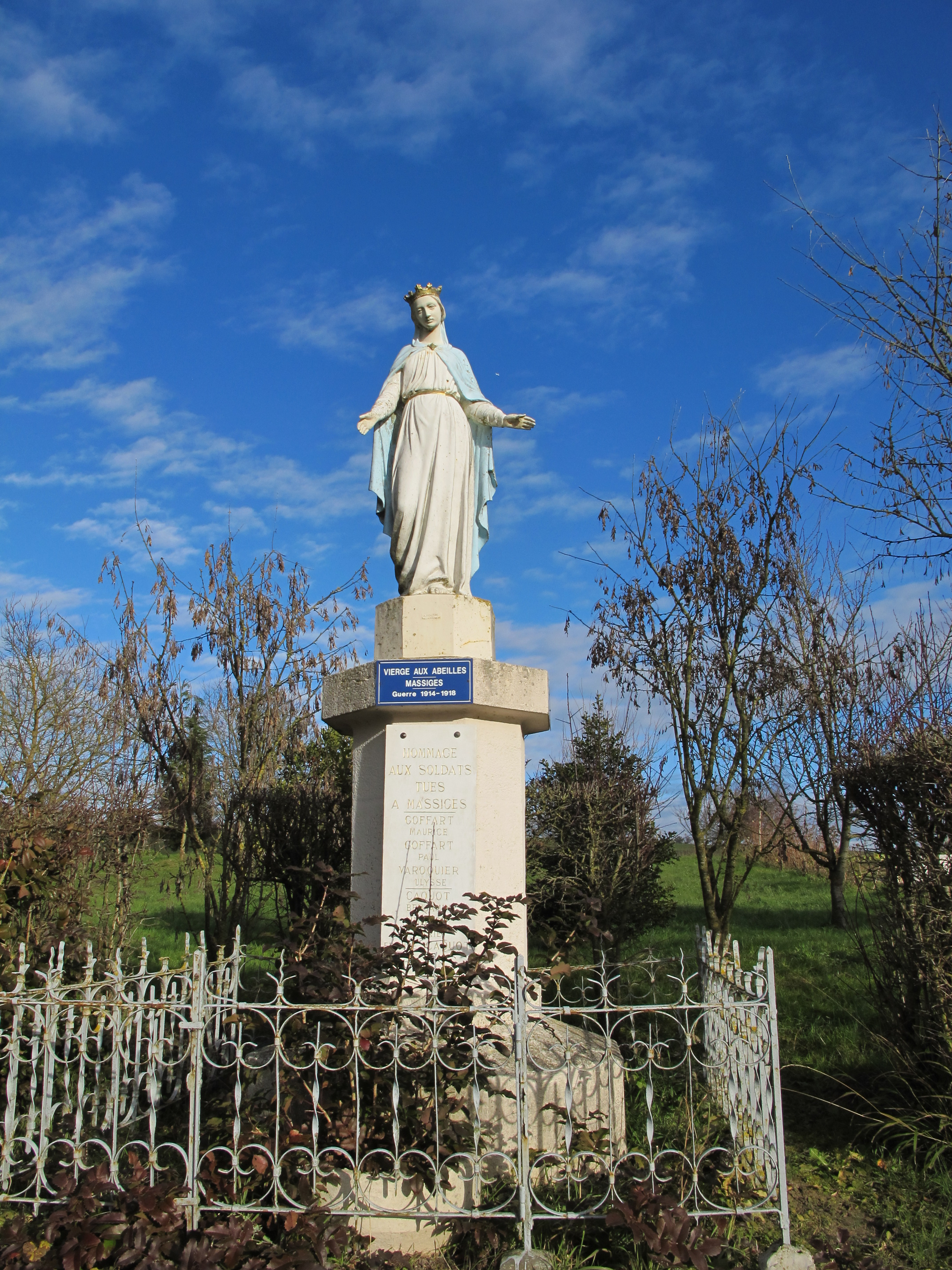 La Vierge aux abeilles de Massiges, détail